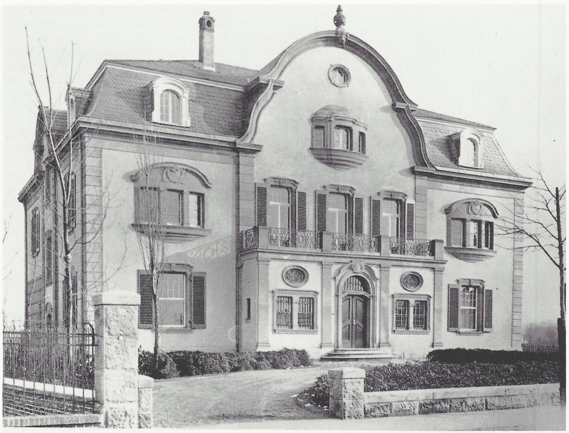 Villa Langen (erbaut 1906/07), Lindenallee 11, Köln-Marienburg: Straßenansicht